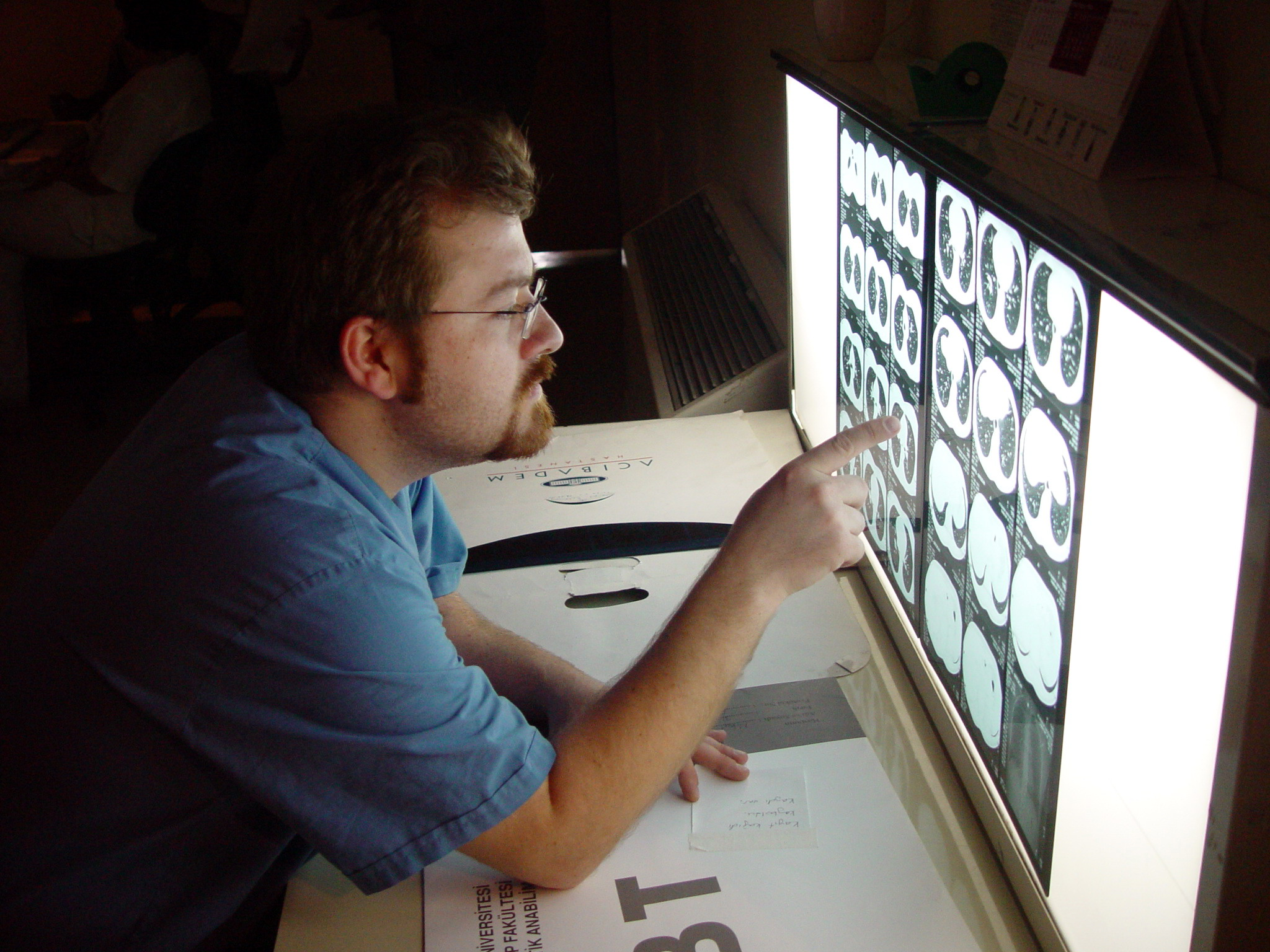 Radiology